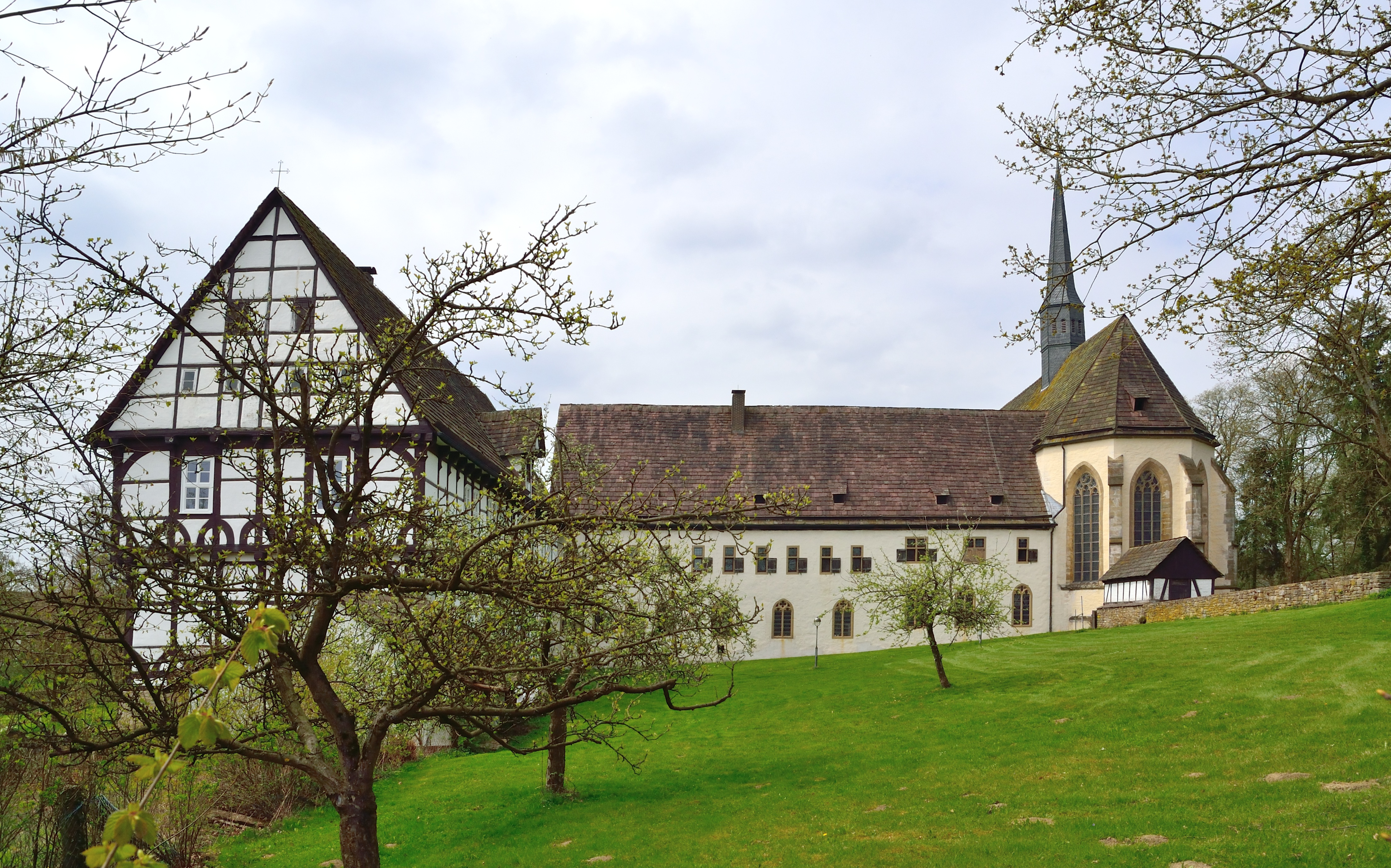 Pfarrhaus, Kapitelsaal und Klosterkirche Falkenhagen